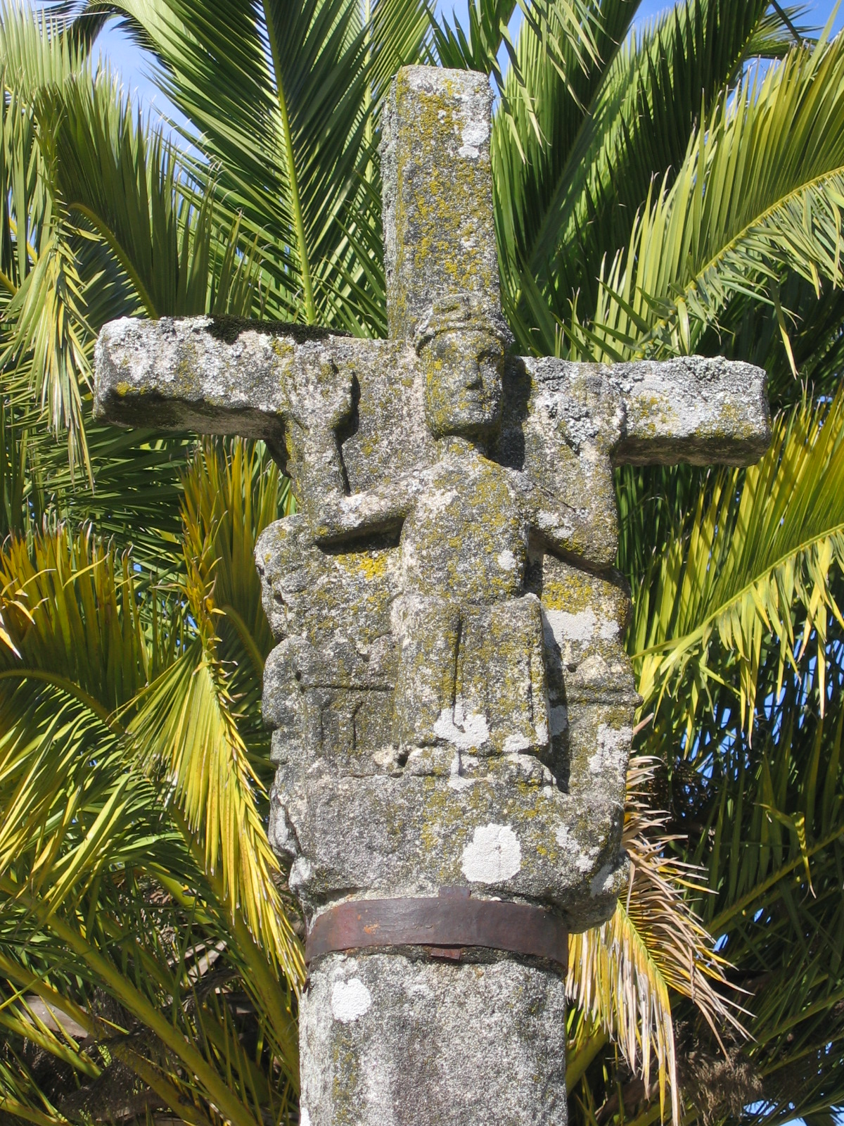 Croix de Melide (La Corogne) (XIV siècle).